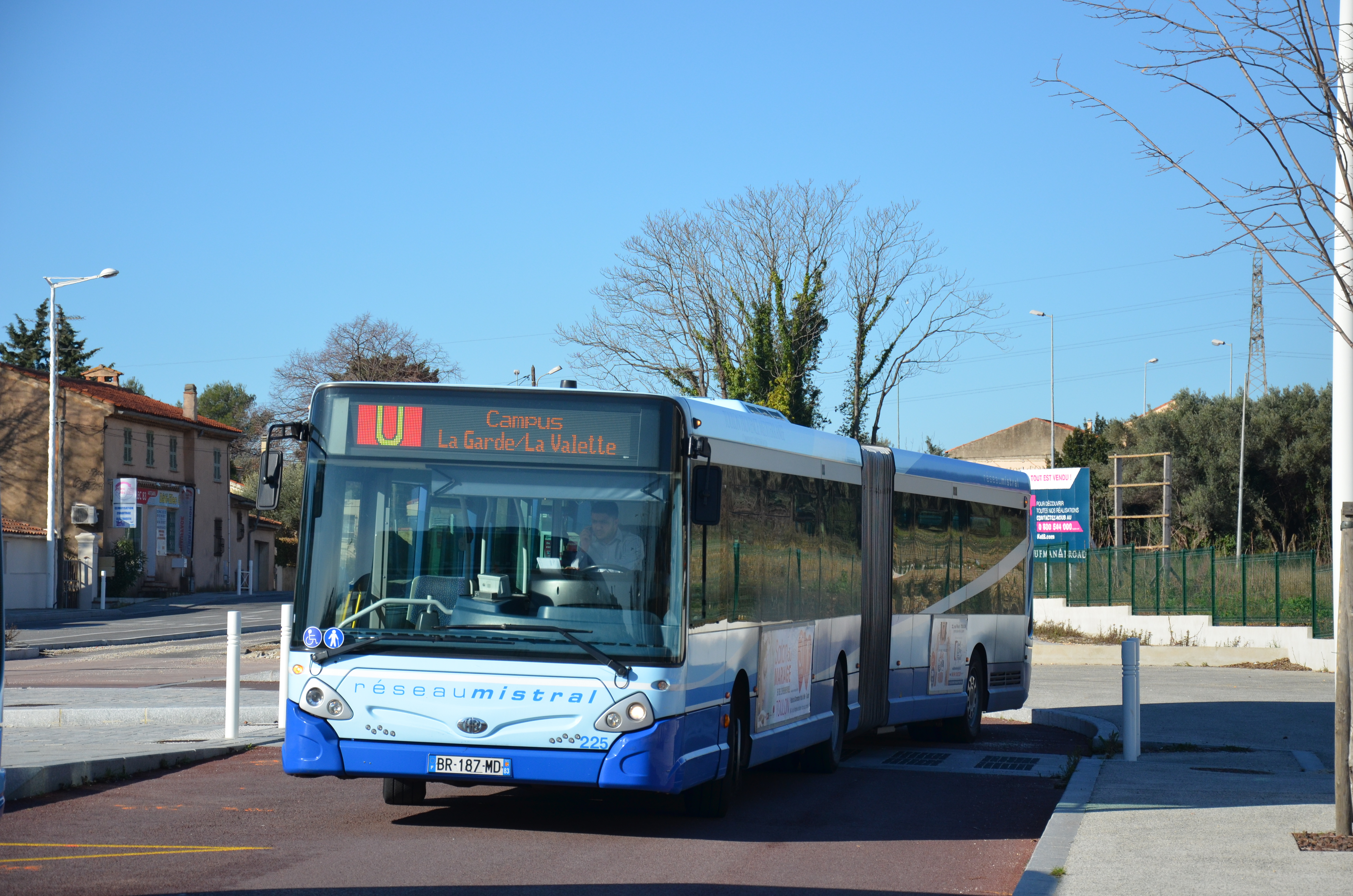 Heuliez GX 427 sur la ligne U, à son terminus Porte d'Ollioules et de Toulon.